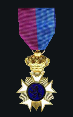 Ritter, Orden des Belgischen Kreuzes